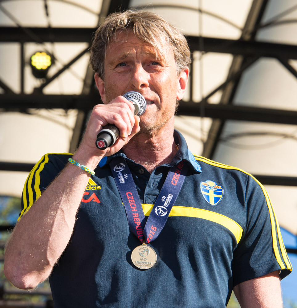 Håkan Ericson och U21-mästarna firas i Kungsträdgården i Stockholm den 1 juli 2015.